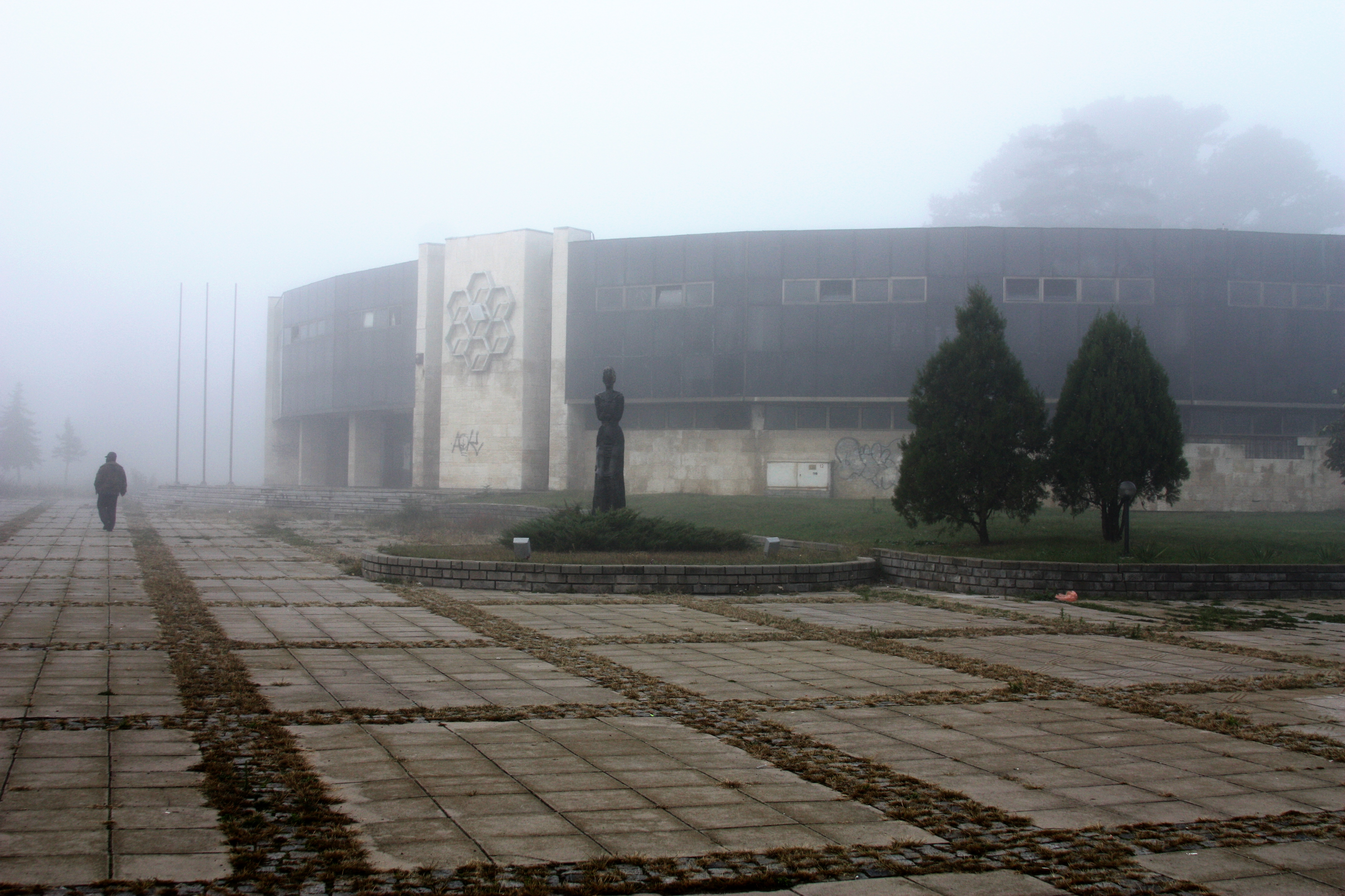 BozhurishteM Boschurischte; bei Sofia; auf dem Weg von Sofia nach Tran; Oktober 2010